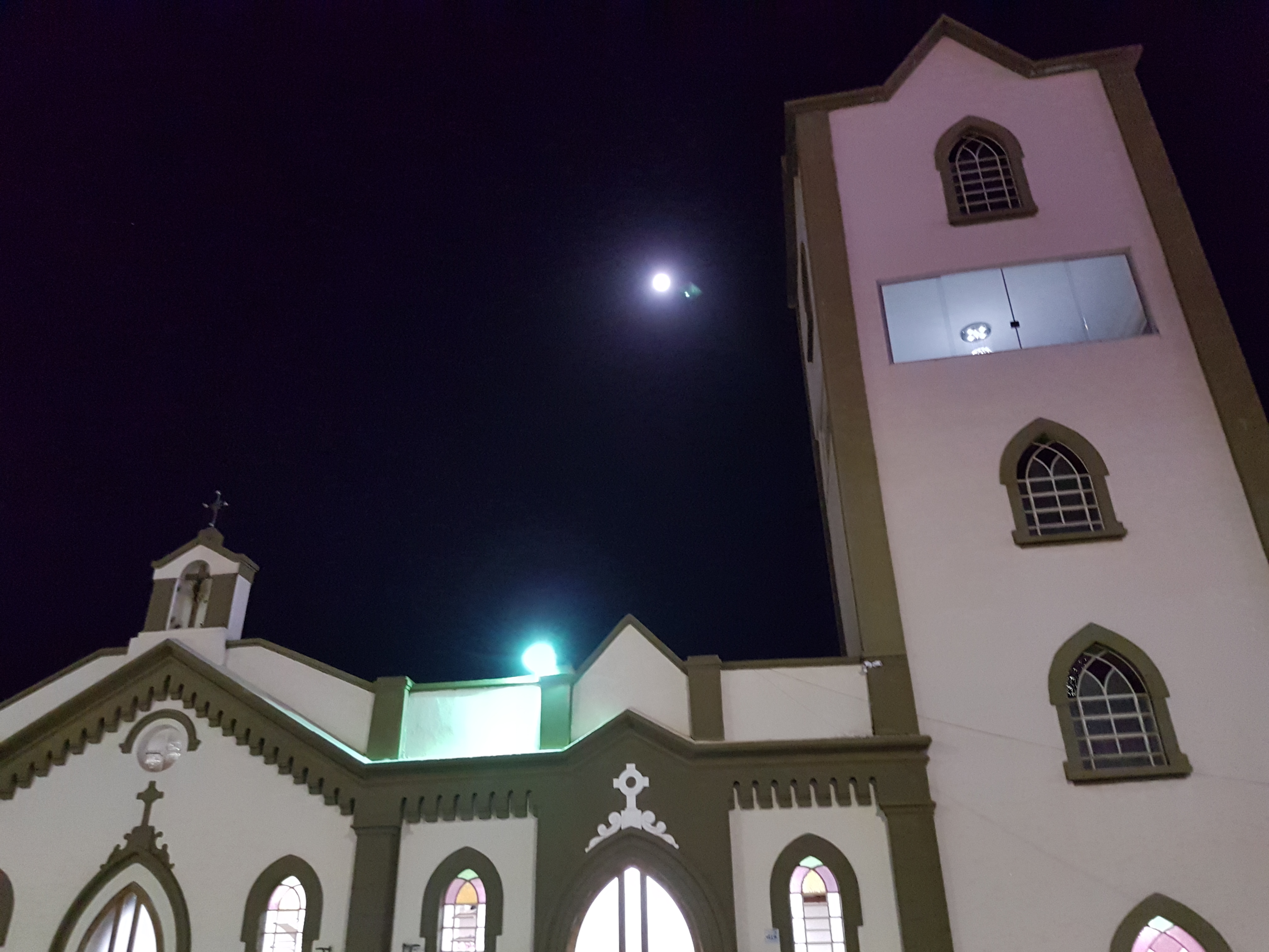 Jardinópolis-SP